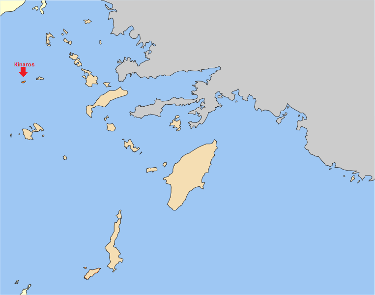 mapa del dodecanès amb la situació geogràfica de l'illa de Kinaros